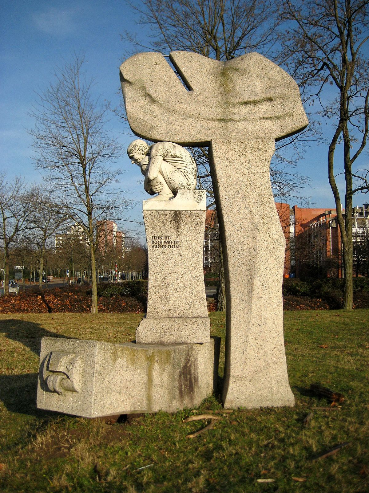 Skulptur „Stein ist … doch was ist außer Stein” von Bildhauer Hans Vaupel an der Elisabeth-Selbert-Schule in Karlsruhe